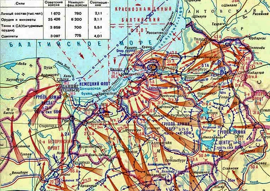 Map of the East Prussian offensive - Карта Восточно-Прусской наступательной операции